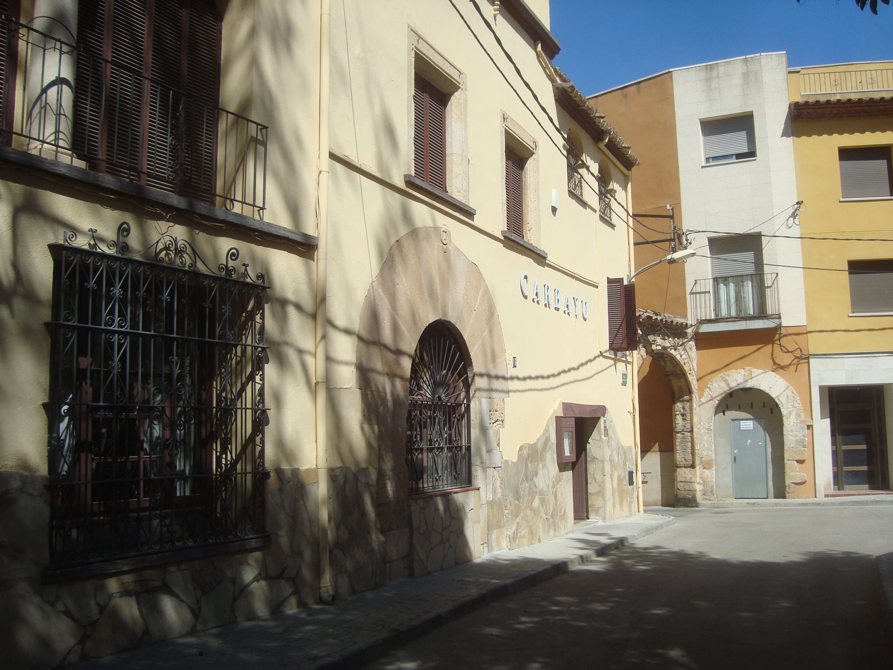 Casa del Marquès de Vallgornera (el Morell)